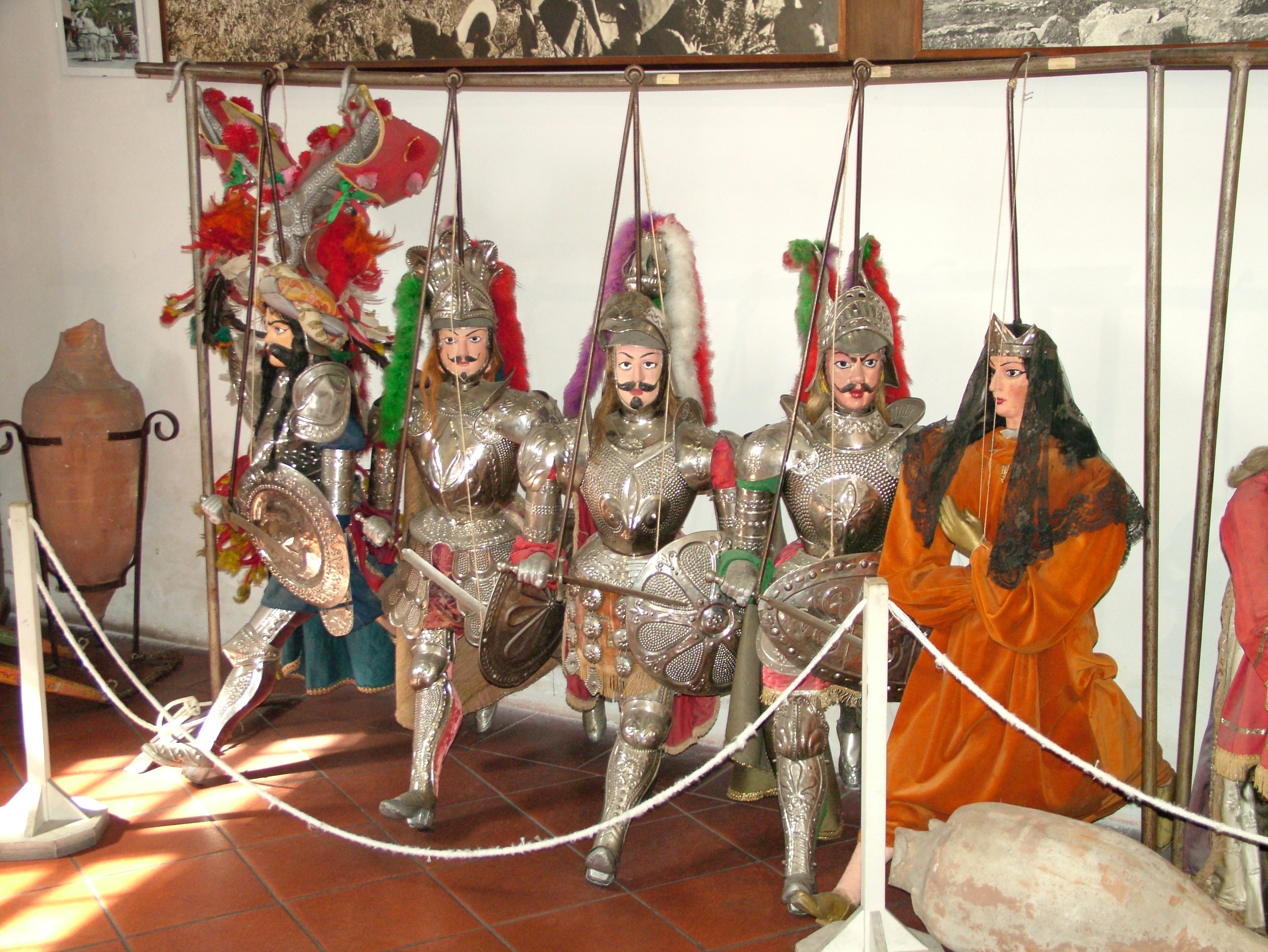 Taormina, Pupi, Sicily, Italia